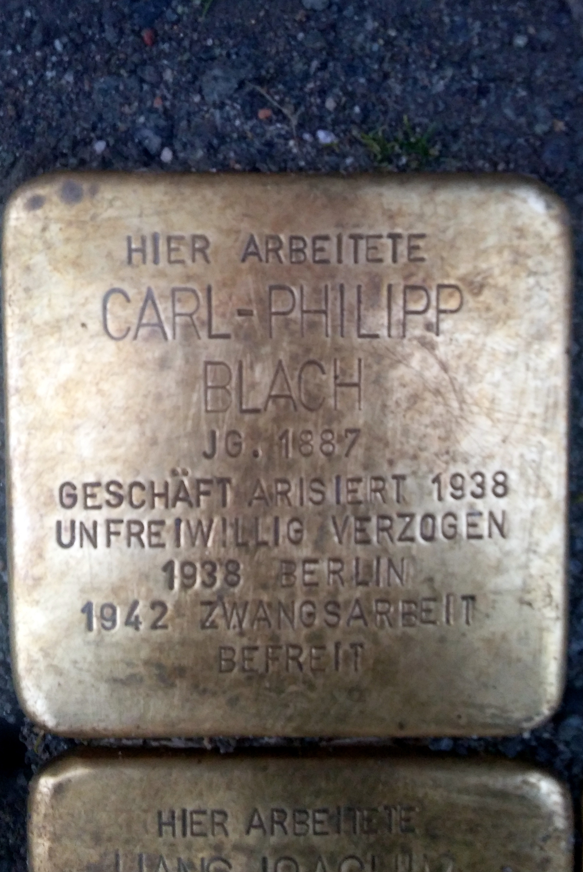 Stolperstein Carl-Philipp Blach, Stralsund Der am 18. Mai 1887 in Stralsund geborene Carl-Philipp Blach war Lederwarenhändler. Er war seit dem 20. Oktober 1916 mit Louise Blach, geborene Körbchen (geboren am 26. April 1895 in Bremen, gestorben 1935 in Stralsund) verheiratet. Aus der Ehe stammte Hans-Joachim Blach, geboren am 16. August 1917 in Stralsund, gestorben am 29. Oktober 1943 in Auschwitz. Carl-Philipp Blach war der Vater von Friedrich Blach, Gerd Blach und Hans Blach. Der Stolperstein wurde am 9. November 2017 verlegt.